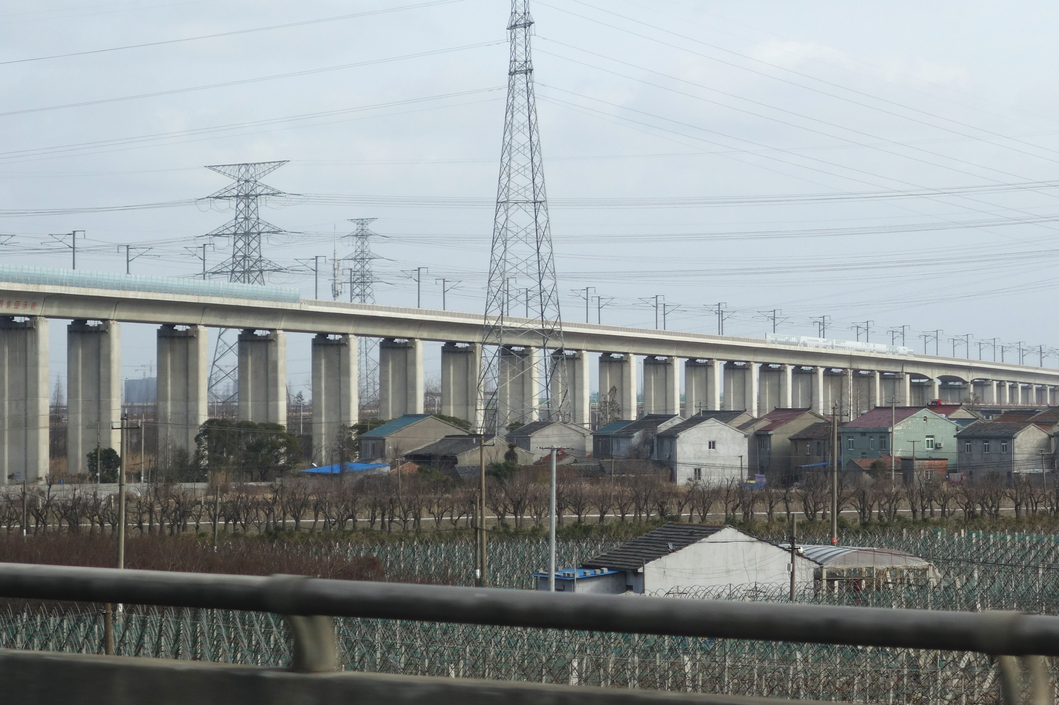 杭甬客运专线